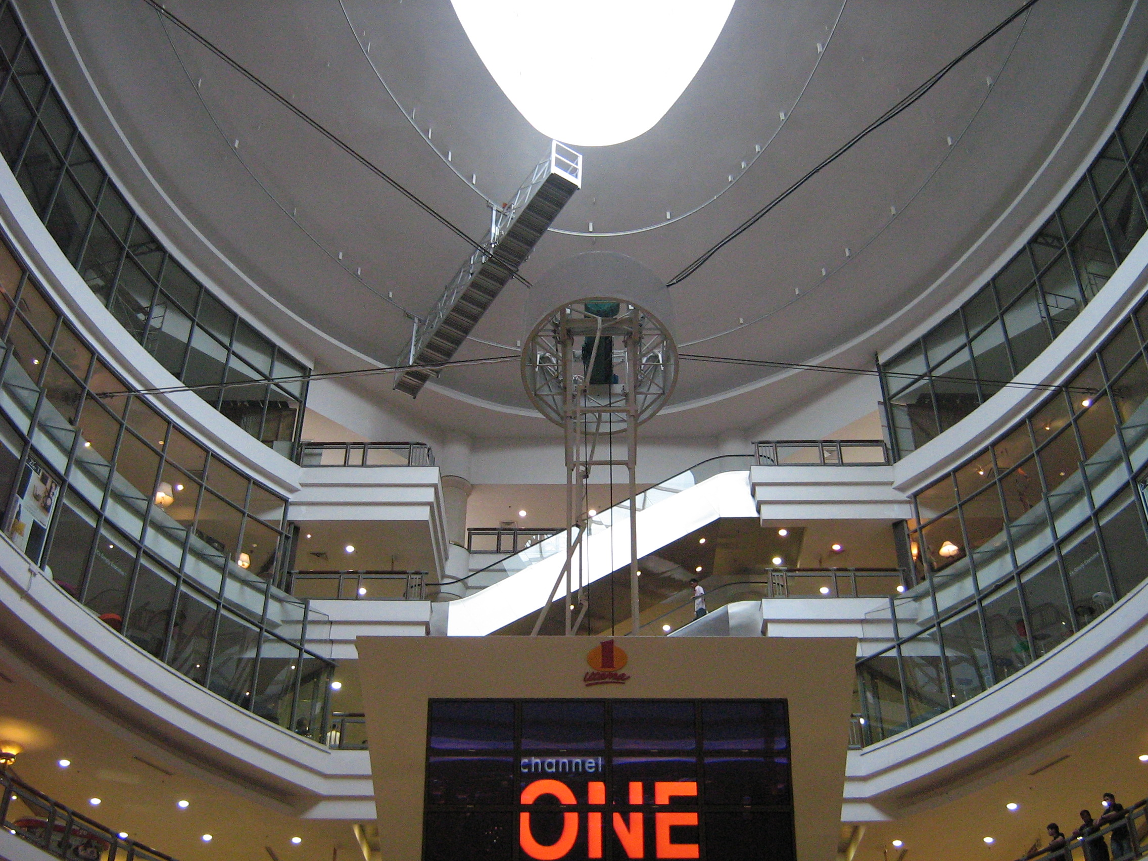 1 utama in malaysia